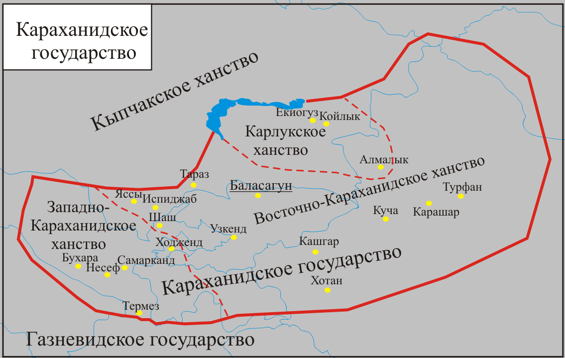 Карта Караханидского государство